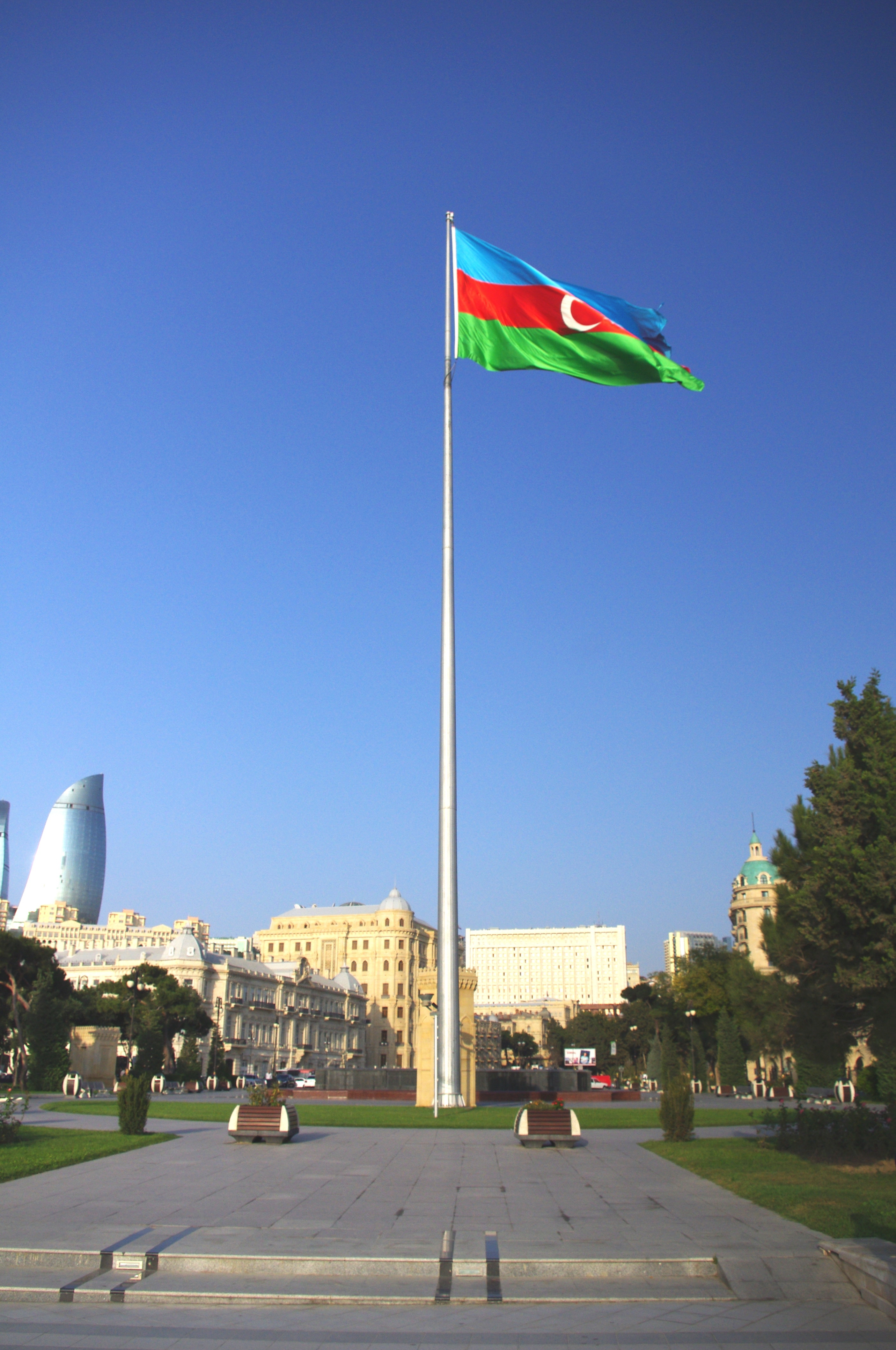 Нац флаг на Бульваре